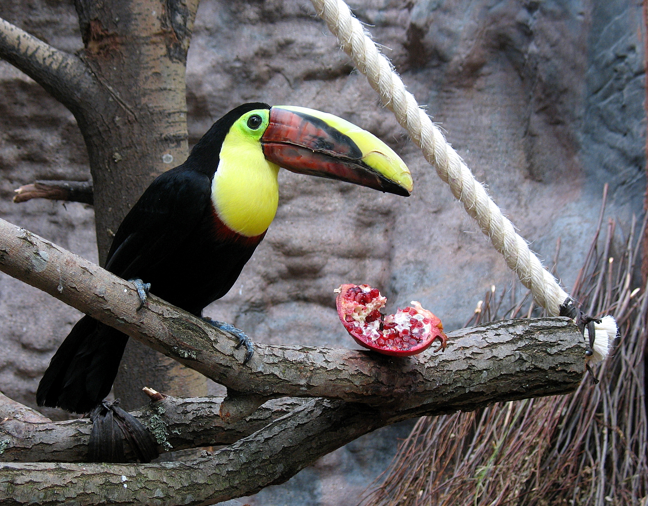 Tuukan Helsingi loomaaias